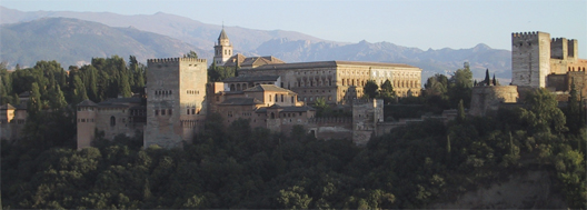 Vista de la Alhambra desde el Mirador de San Nicolás.